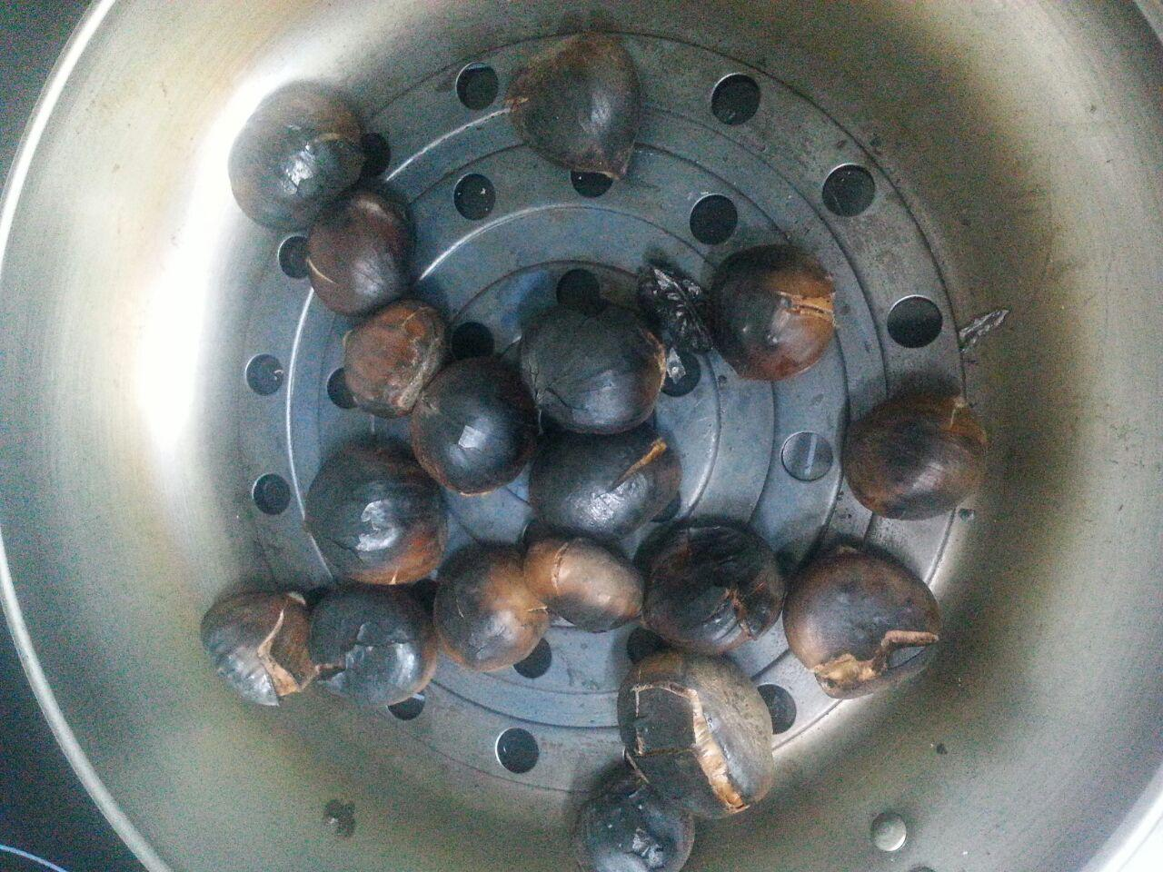 Gaztaina erreak vitro-zeramika sukalde baterako egokia den zartagin batean.